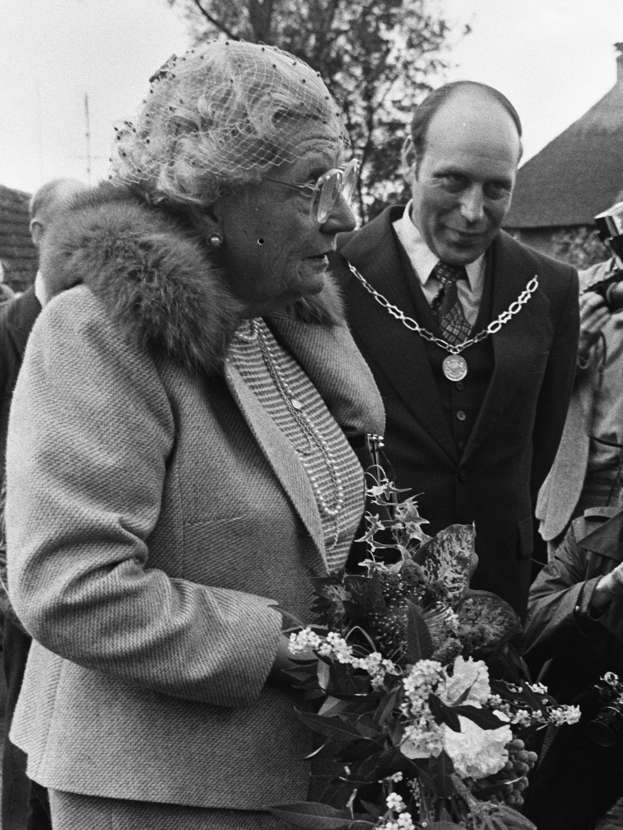 Koningin Juliana ontvangt bloemen van een meisje in klederdracht; op de achtergrond burgmeester F. Niemeijer